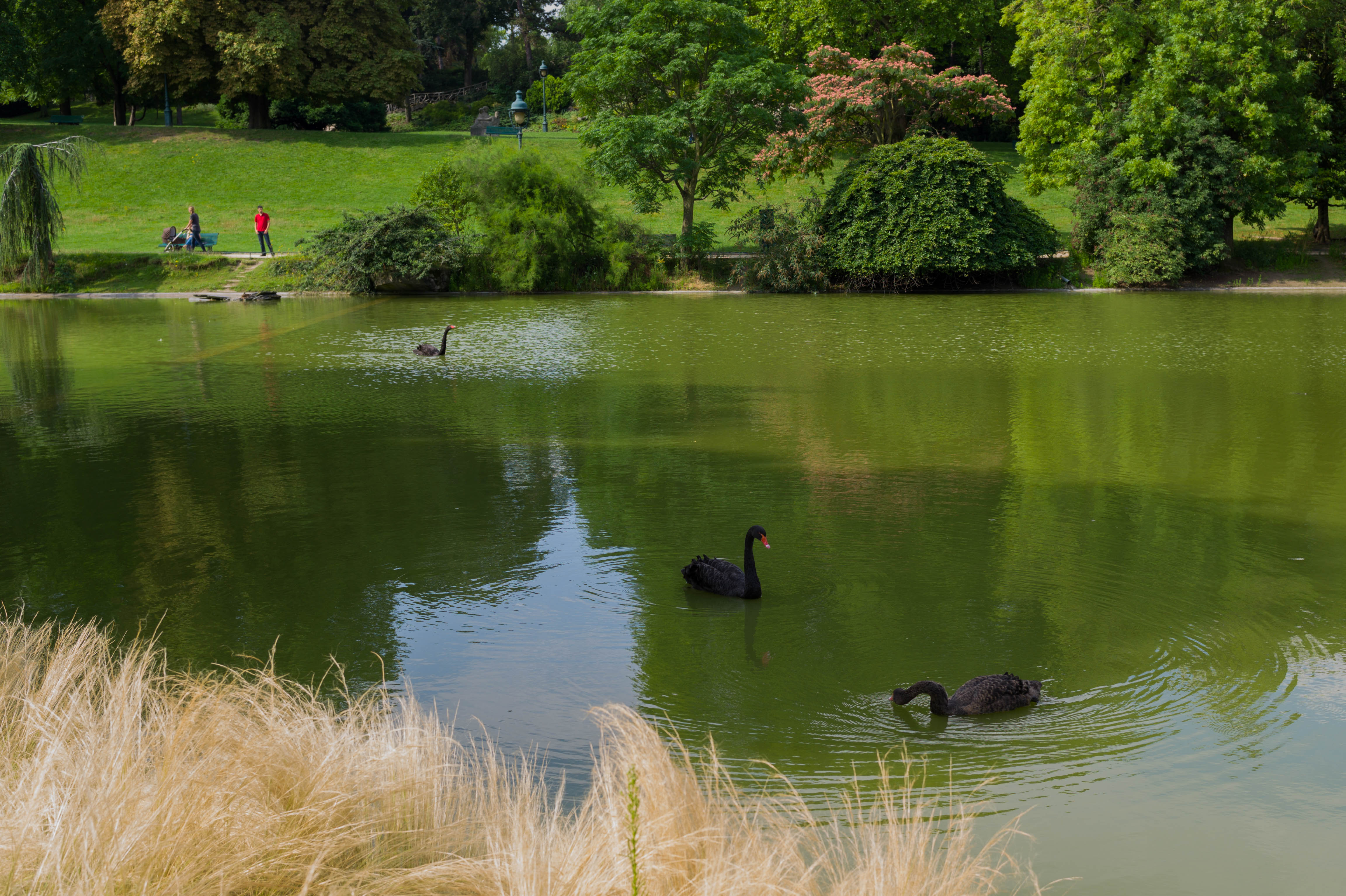 Parc Montsouris Paris 14e